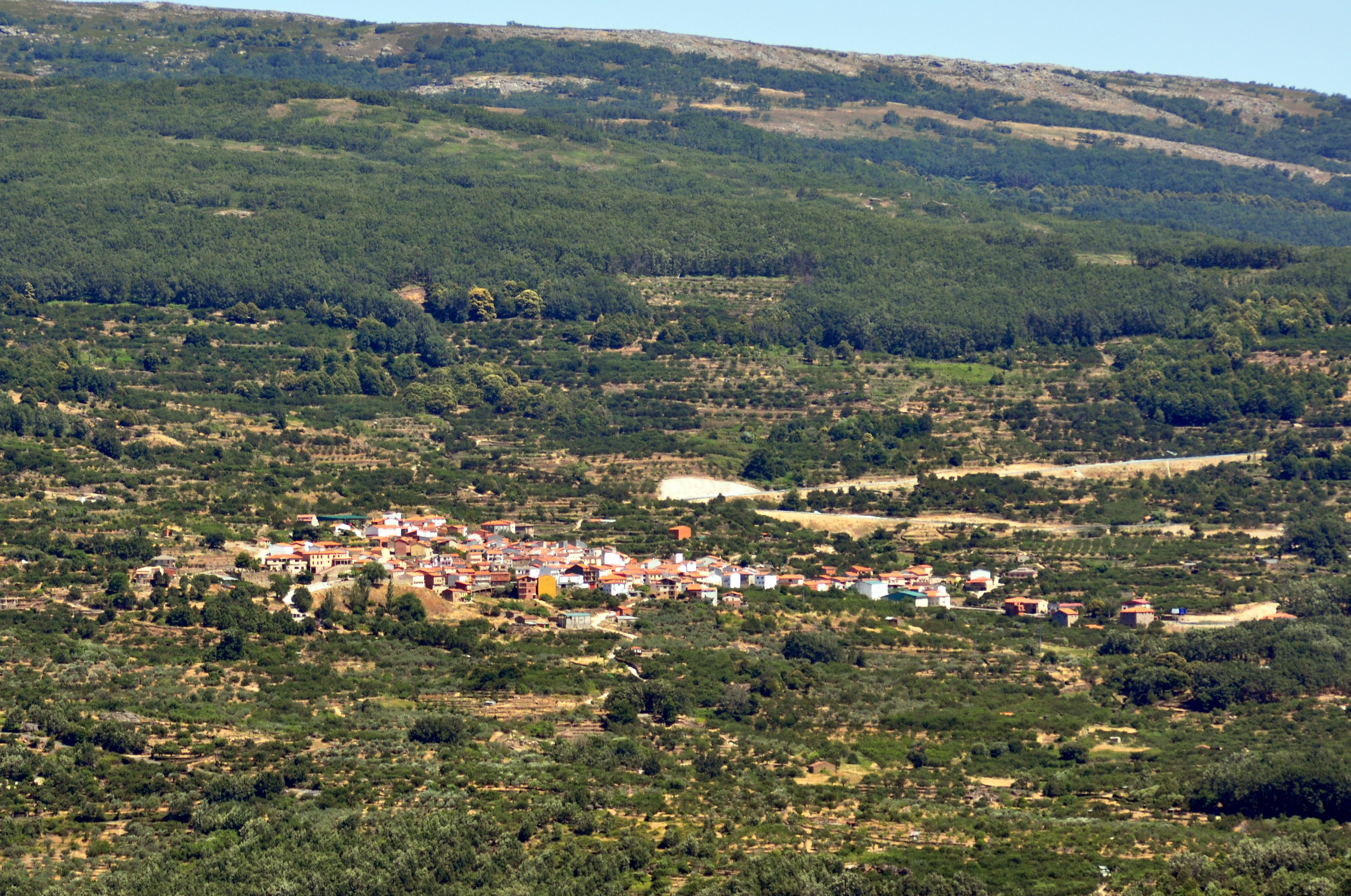 Vista de la población de Cabrero, en el Valle del Jerte (provincia de Cáceres, España), desde la población vecina de El Torno.